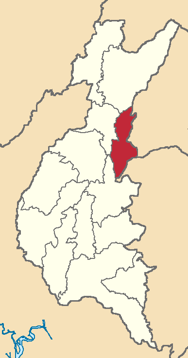 Mapa localizador del cantón en Los Ríos, Ecuador